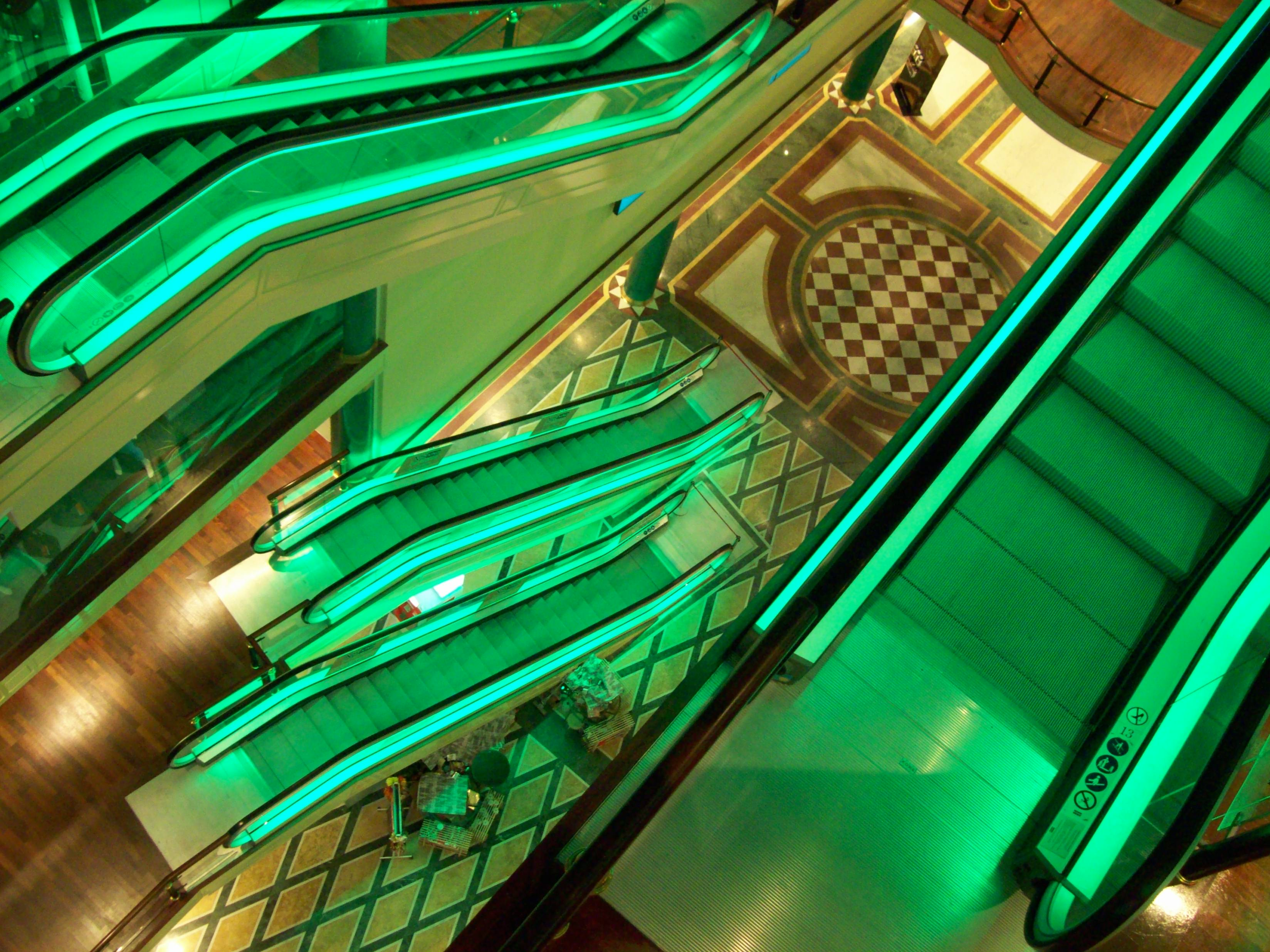 Shopping Mall, Dzirnavu iela, Riga